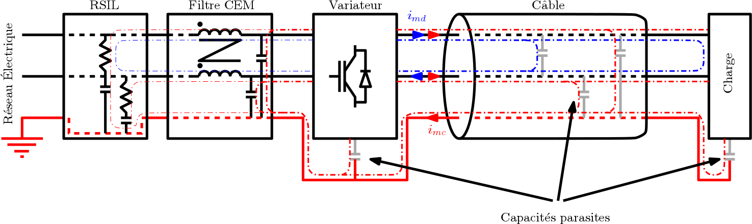 Cette figure présente les éléments dans une chaîne de conversion qui permettent d'étudier les perturbations électromagnétiques conduites